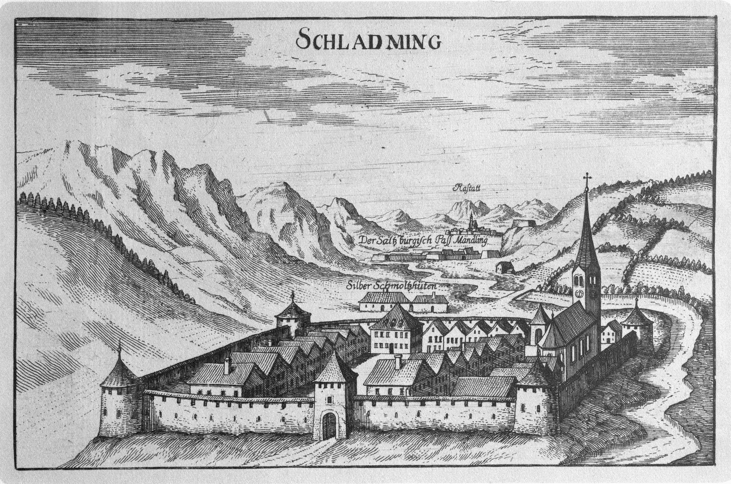 G. M. Vischers Käyserlichen Geographi, Topographia Ducatus Stiriae, Das ist: Eigentliche Delineation / und Abbildung aller Städte / Schlösser / Marcktfleck / Lustgärten / Probsteyen / Stiffter / Clöster und Kirchen / so es sich im Herzogthumb Steyrmarck befinden; Und anjetzo Umb einen billichen Preyß zu finden seynd Bey Johann Bitsch Universitäts Buchhandlern / Auff dem Juden=Platz bey der guldenen Saulen. Graz 1681 Die Nummerierung der Dateien folgt der alphabetischen Reihung der Ortsnamen und entspricht nicht dem Vischer-Register